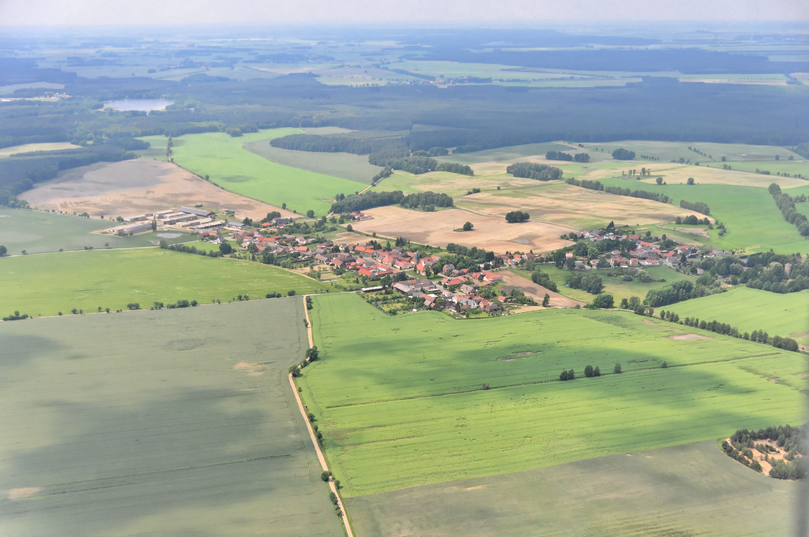 Schöna-Kolpien auf einem Überführungsflug vom Flugplatz Schwarzheide-Schipkau über Potsdam, Lüneburg zum Flugplatz Nordholz-Spieka